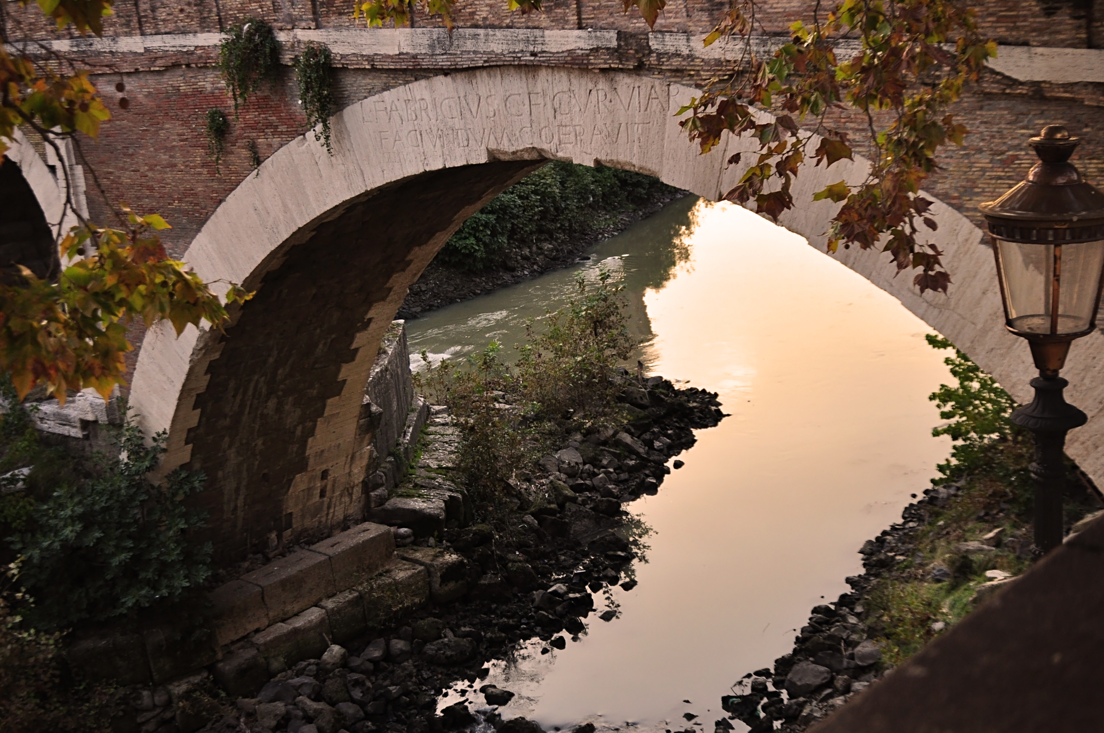 FACIVNDVM . COERAVIT